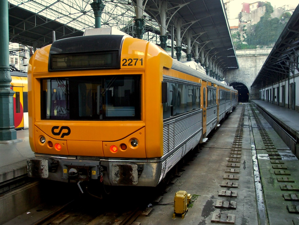 Local: Estação de São Bento (Porto) [Linha do Minho, PK 2,7] Data e hora: 25 de Novembro de 2008 [08h28] Material: Automotora 2271 (Unidade Tripla Eléctrica) [Alstom • EMEF-GOE]